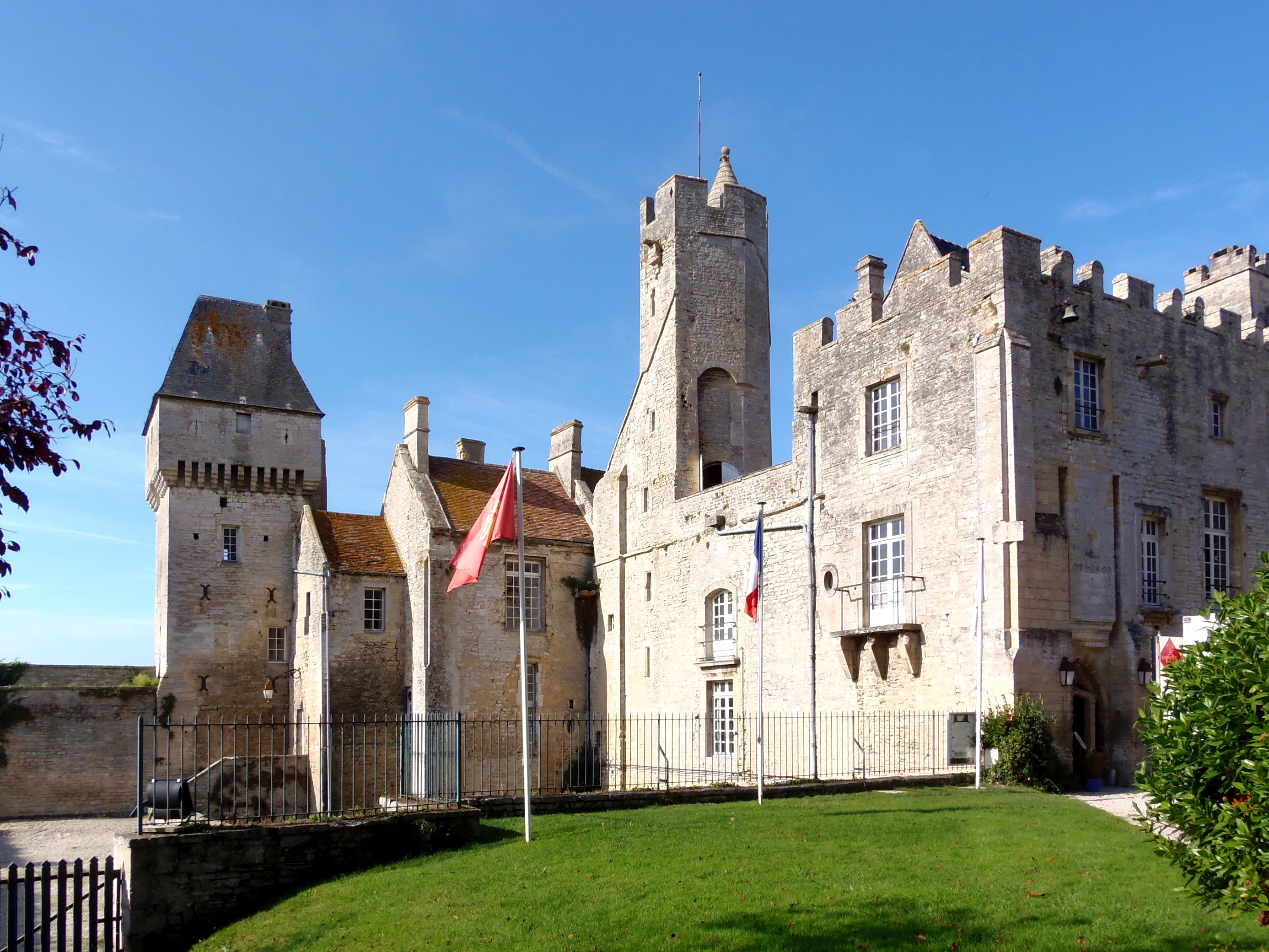 Creully (Normandie, France). Le château.